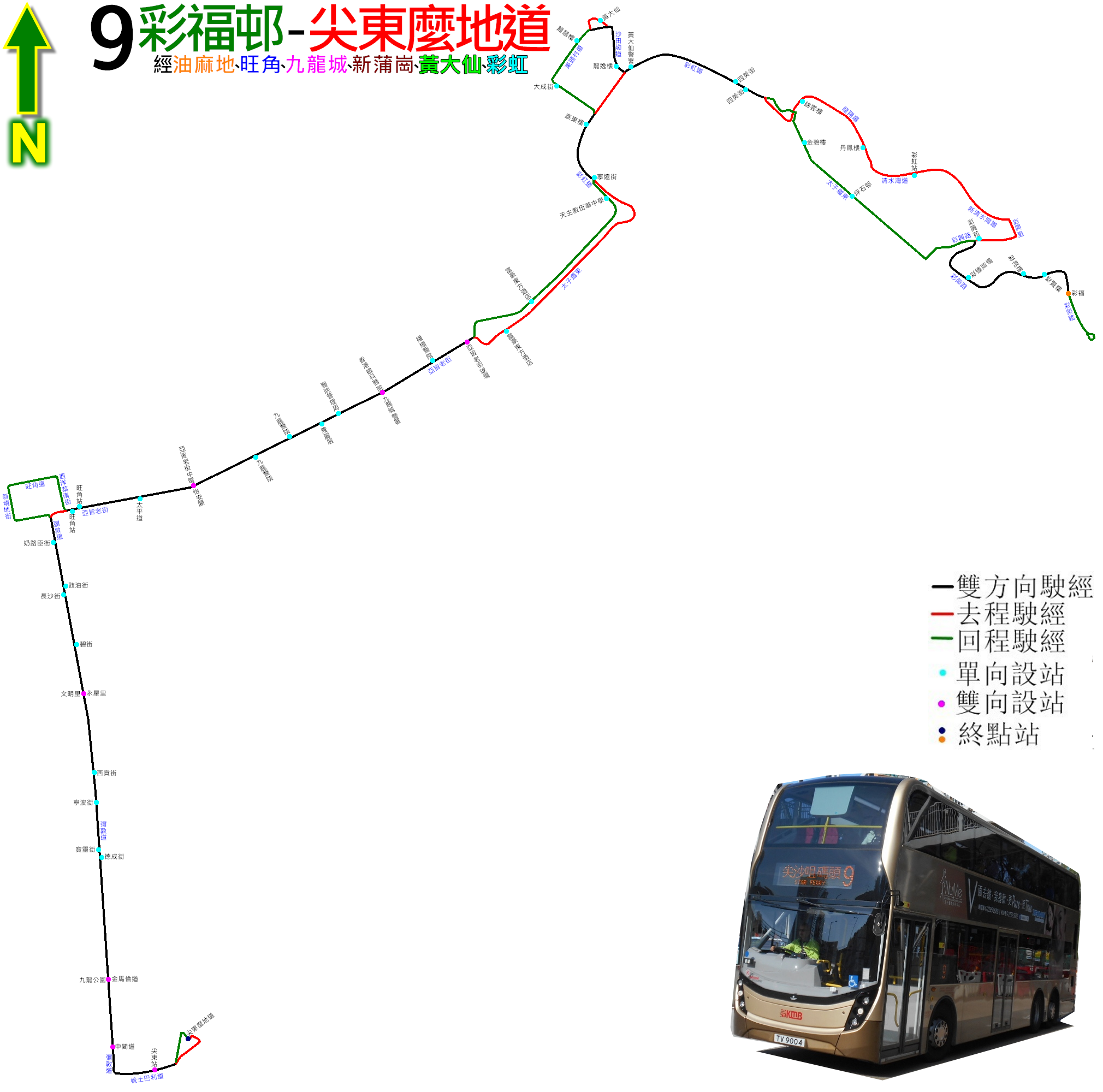 中文（香港）: 九巴9號線的走線圖